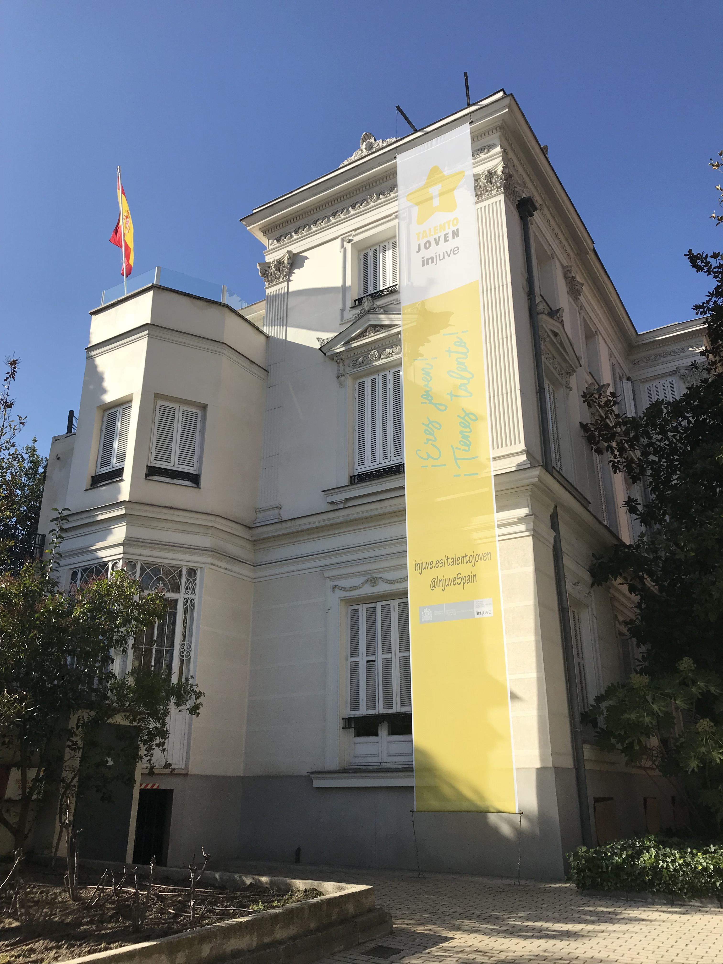 Palacete del conde de la Eliseda